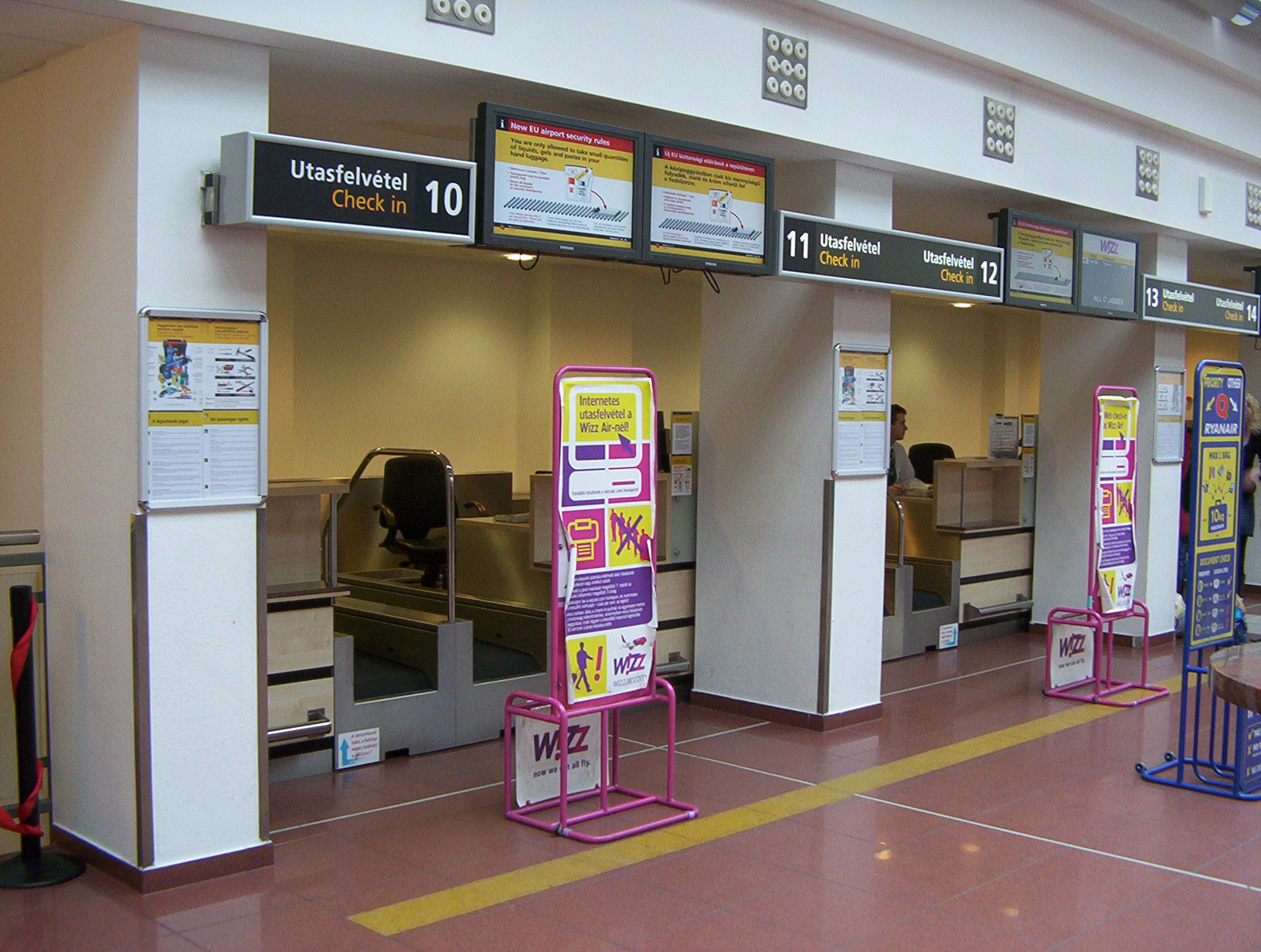 A Liszt Ferenc Repülőtér 1-es termináljának Check-in (utasfelvételi) pultjai (a tizestől)